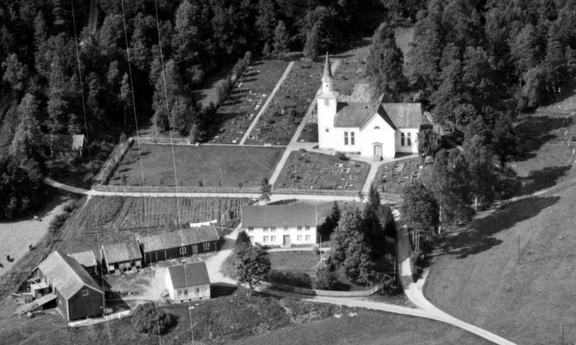 Vigmostad kirke, kirkegård og prestegården